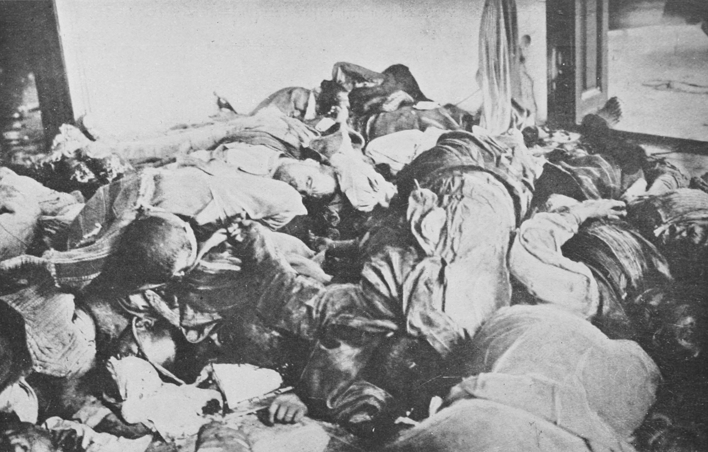 Soldados serbios prisioneros asesinados en agosto de 1914.